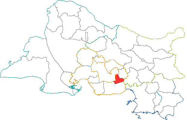 Situation du canton dans le département des Bouches du Rhône (France)